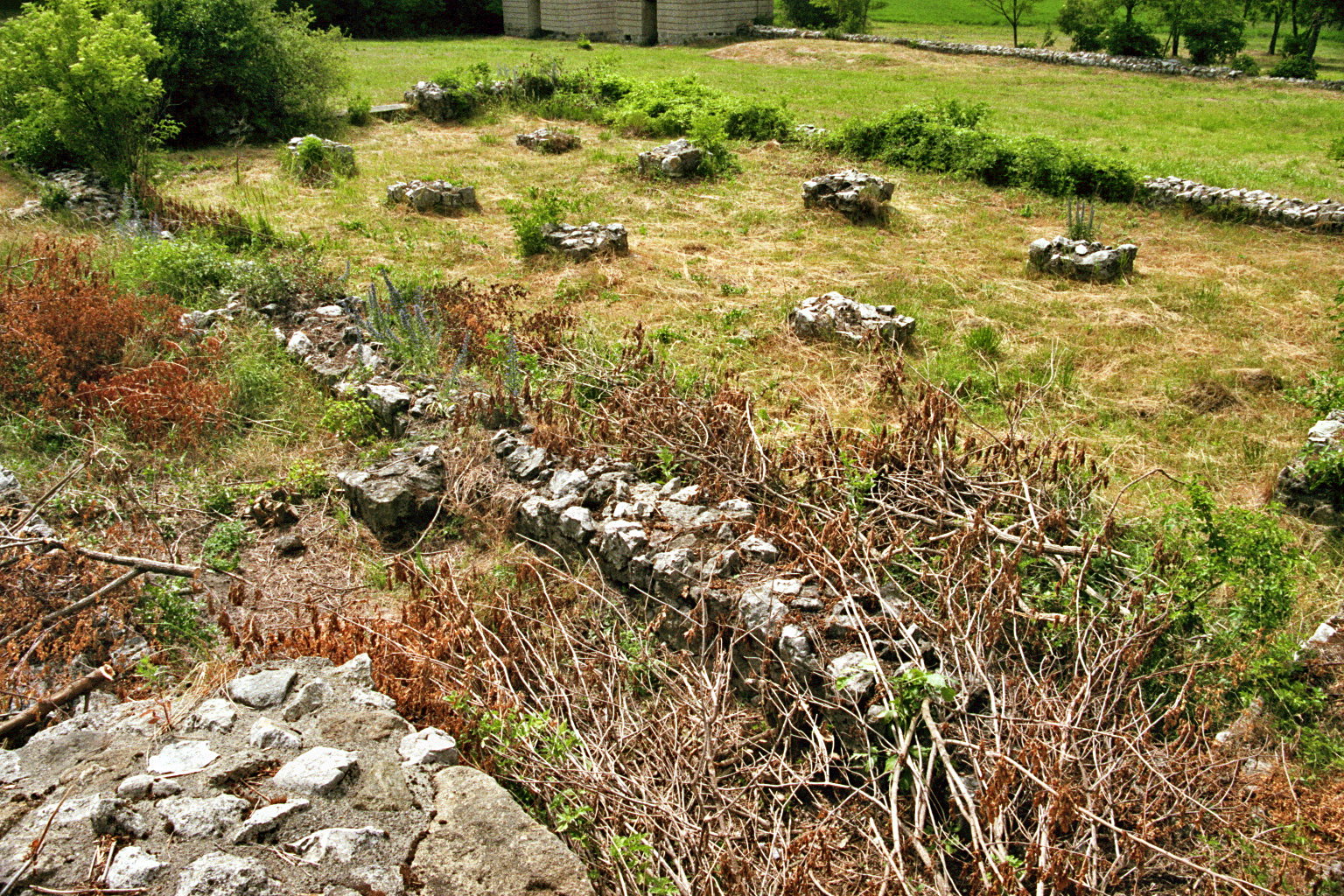 Kastell Tokod, Ungarn: Blick auf das Horreum (Getreidespeicher). This is a photo of a monument in Hungary, Identifier: 6487